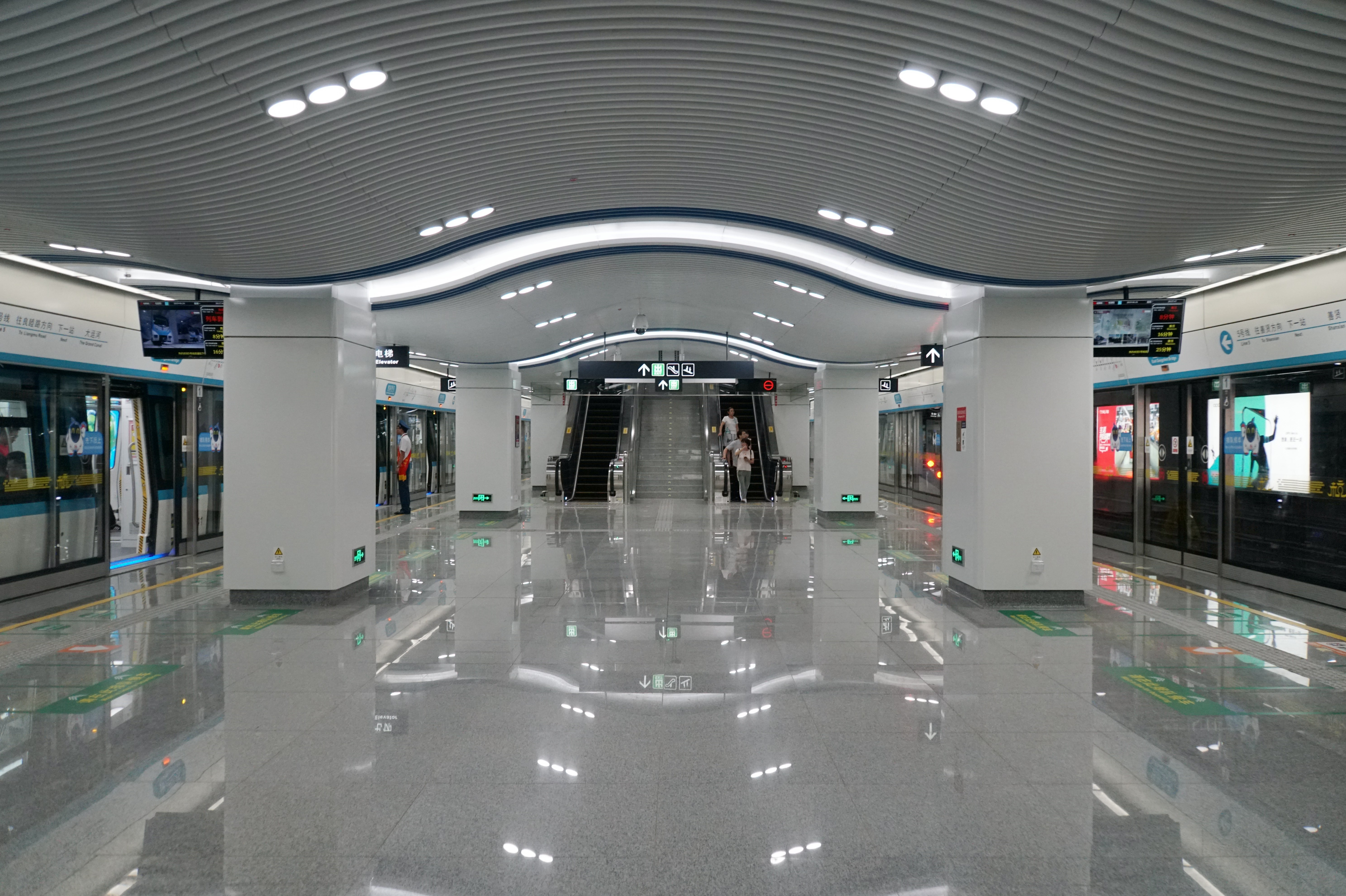 杭州地铁5号线拱宸桥东站站台